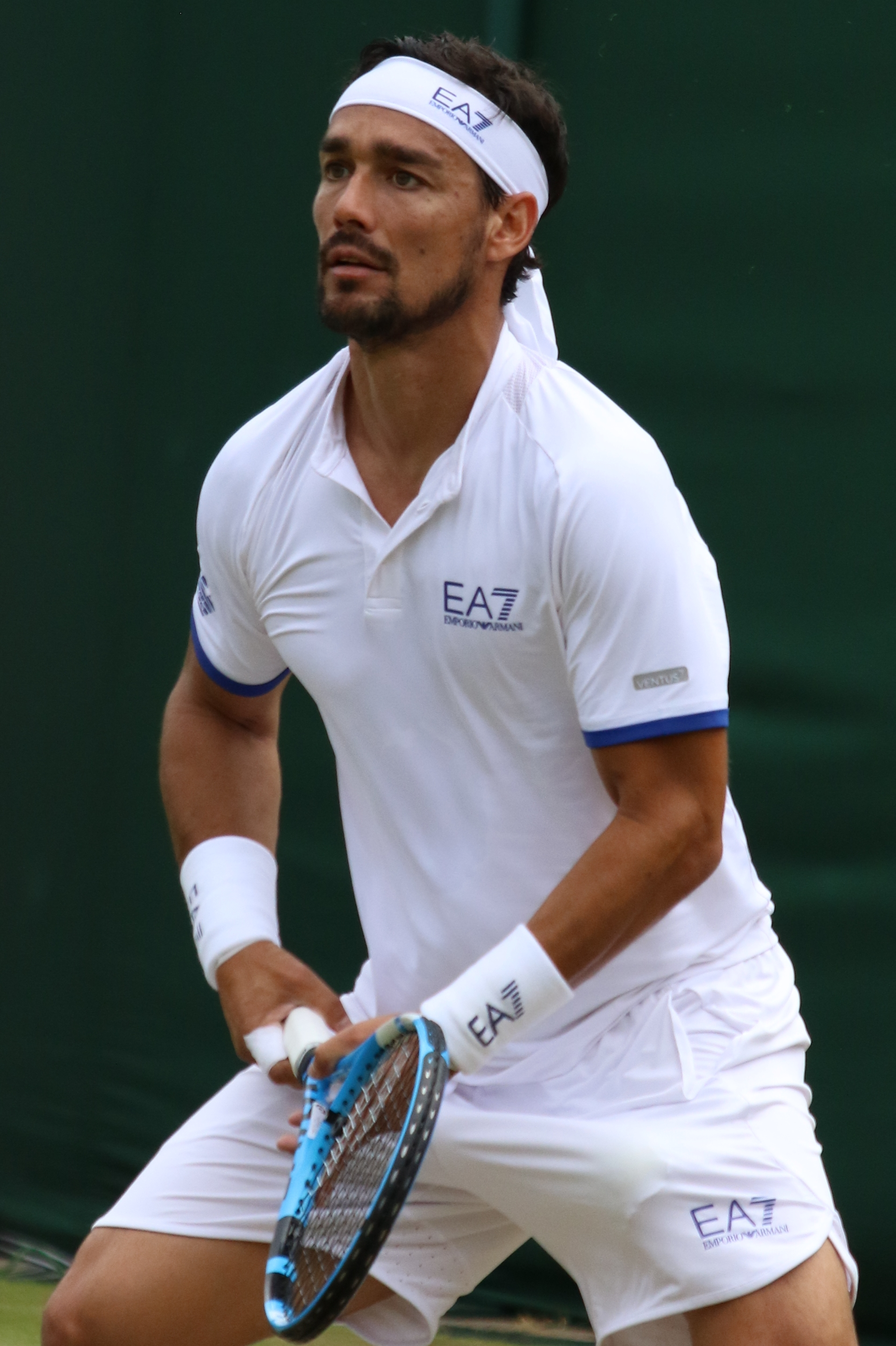 Fognini WM19 (23)